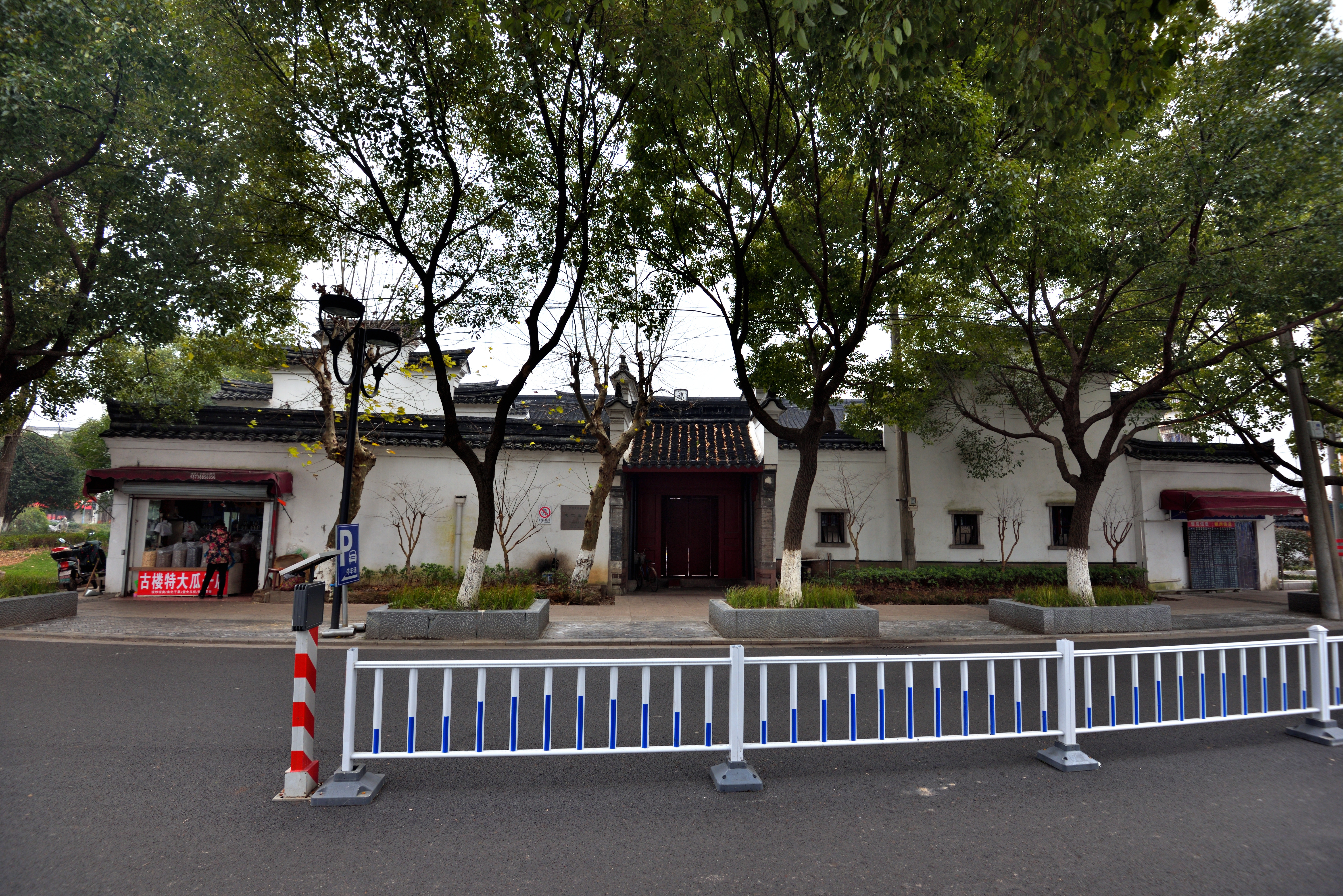 镇海朱仁房大屋